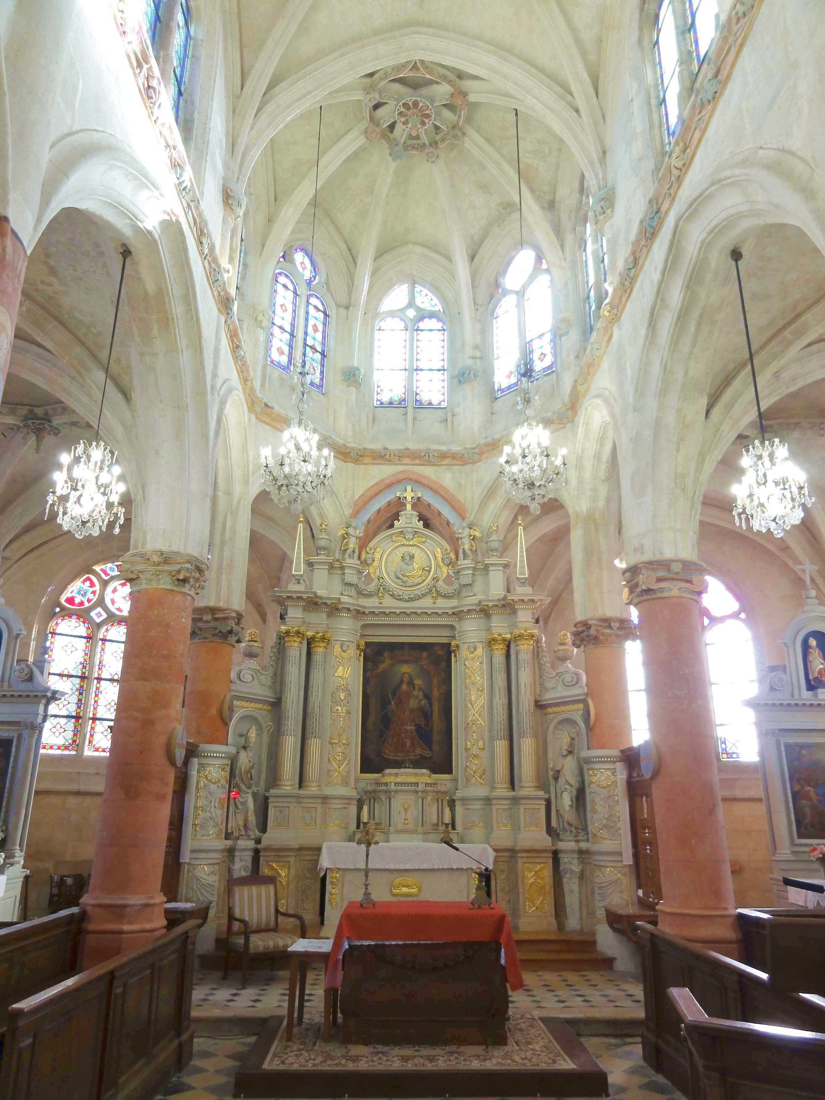 Intérieur de l'église - voir titre.